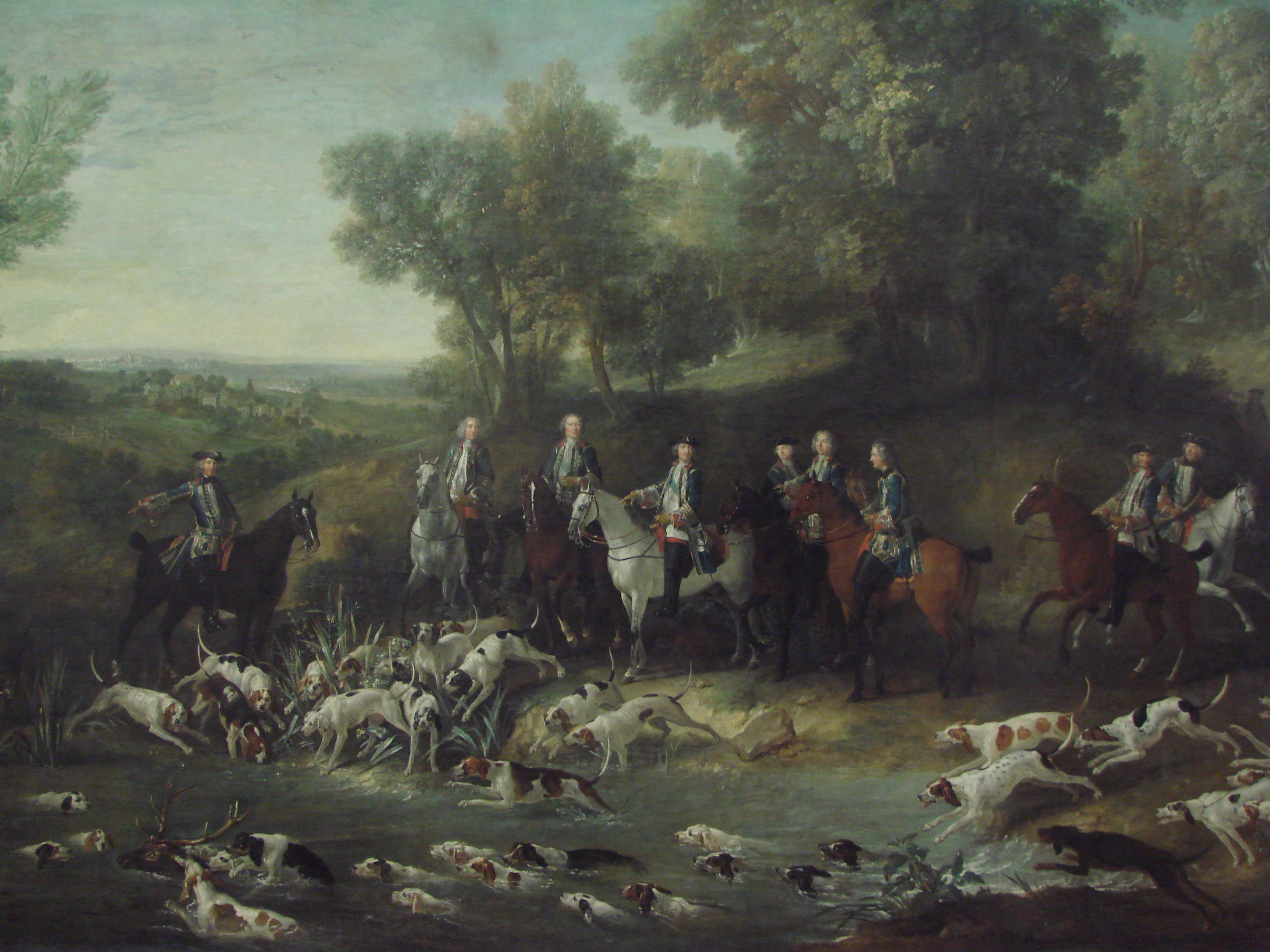 Louis XV chassant le cerf dans la forêt de Saint-Germain, 1730, par Jean-Baptiste Oudry (1686-1755). Collection du Musée des Augustins, ville de Toulouse, région Midi-Pyrénées (France).